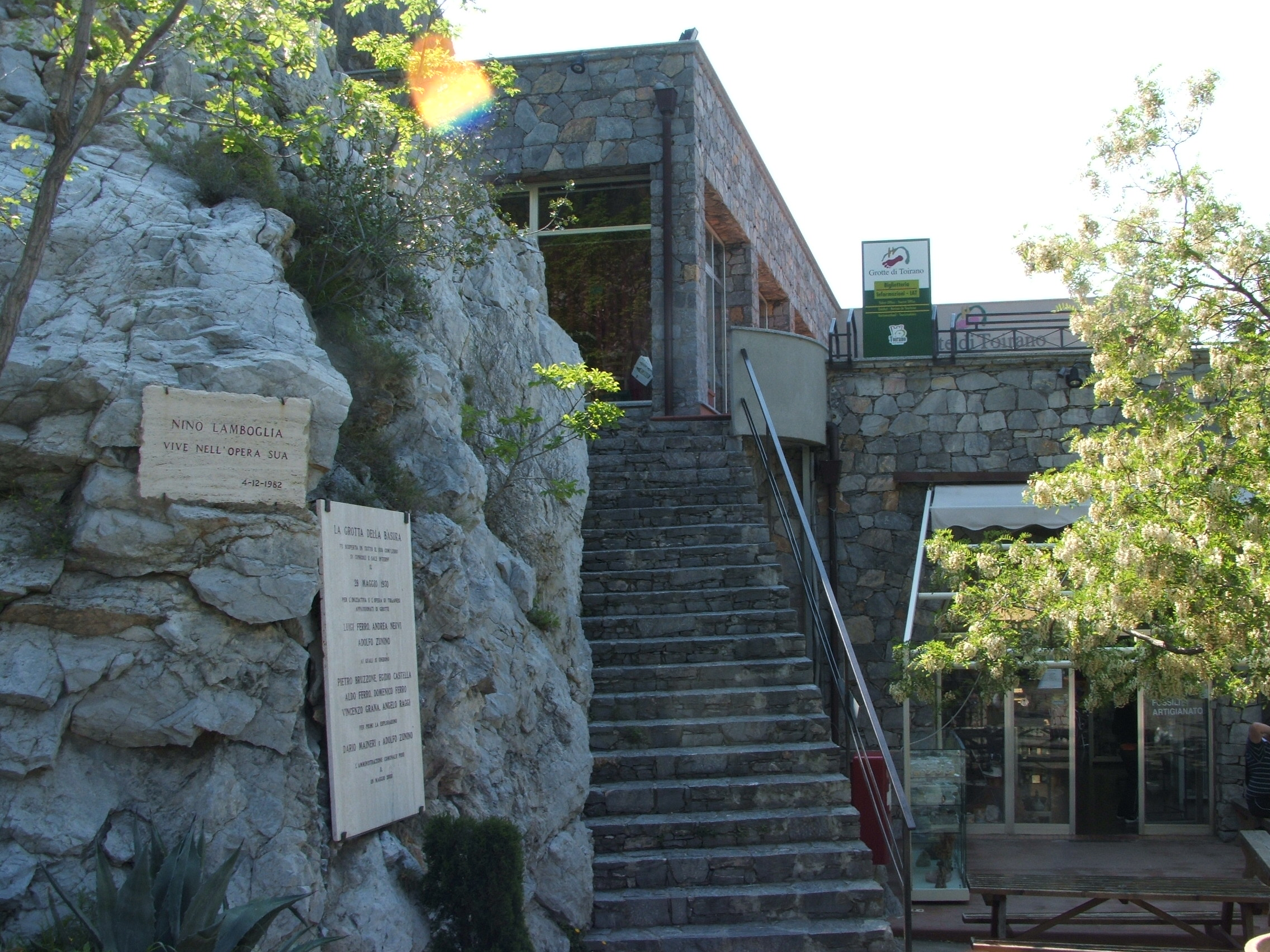 Grotte di Toirano, a Toirano, Savona, Liguria, Italia